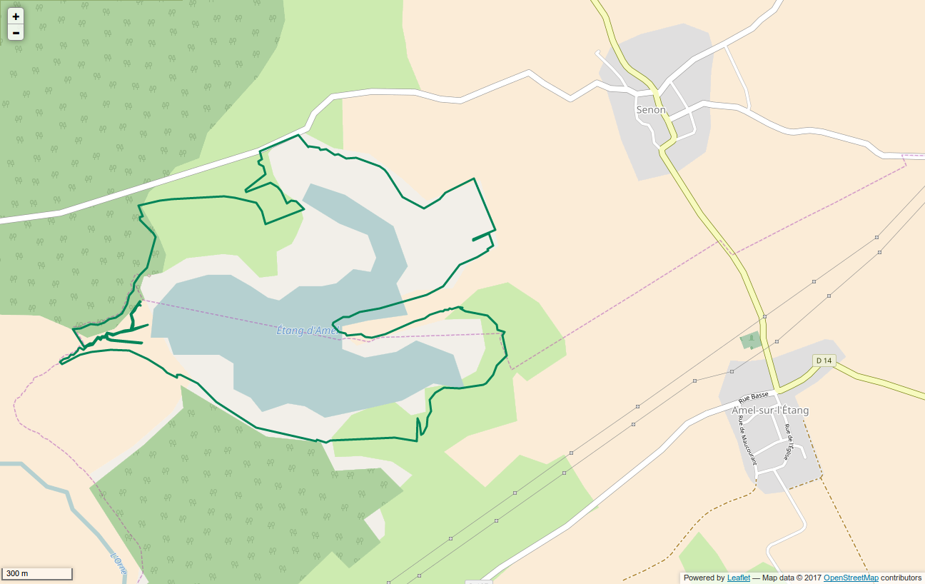 Périmètre de la RNR de l'Etang d'Amel.